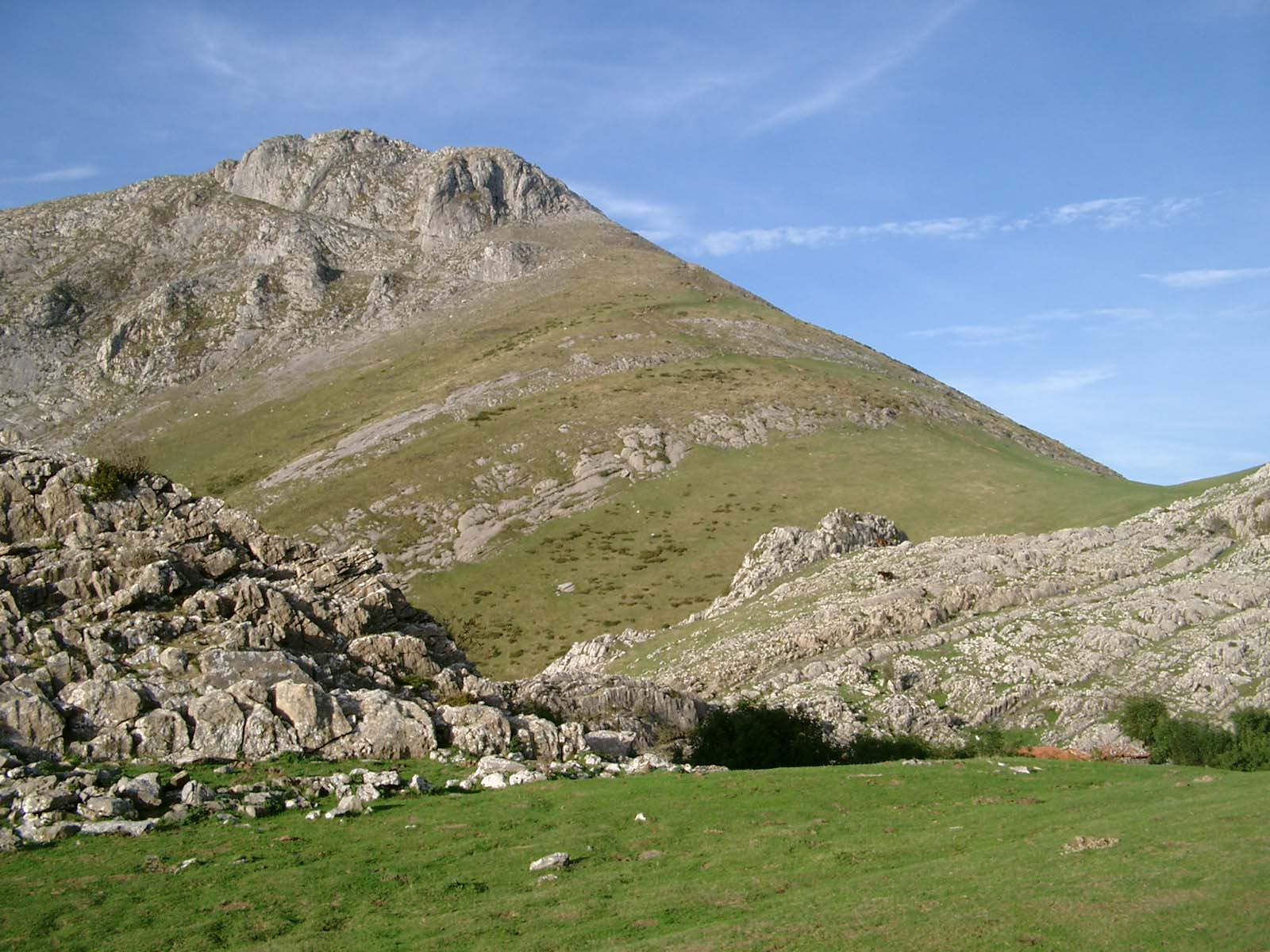 Txindoki mendia, GIPUZKOAN goiko magaletik ikusia Photoshop progamarekin tamainaz txikitua